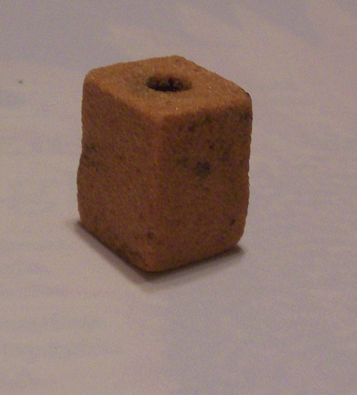 Description:Kostka awkwarystyczna. Author:Ewkaa